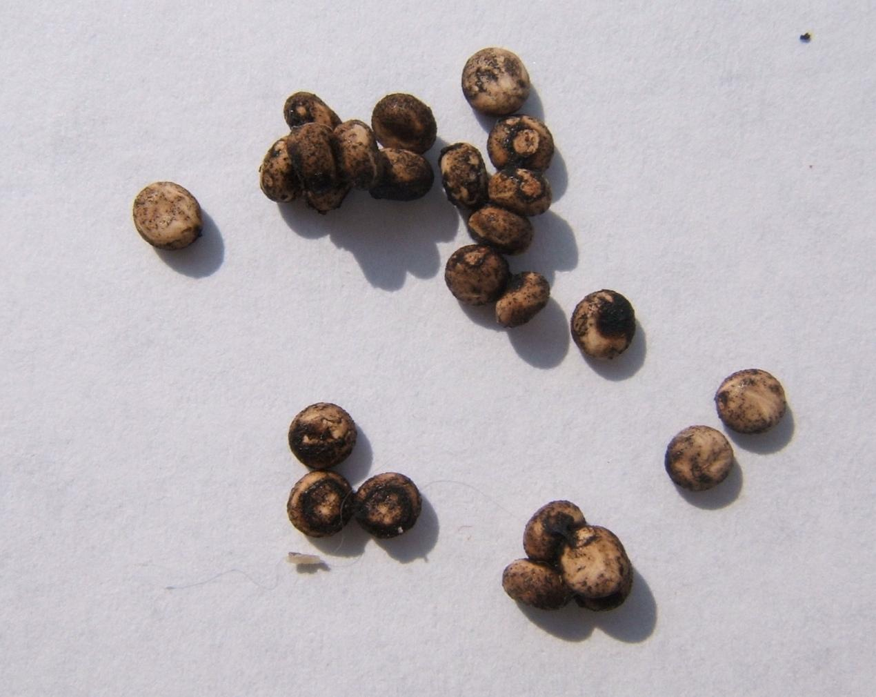 Antheraea yamamai eggs taken by Shawn Hanrahan.